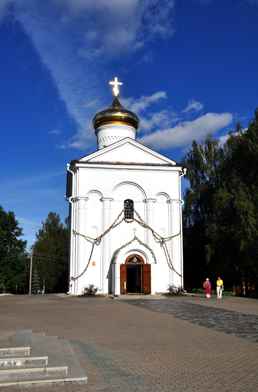 Беларуская (тарашкевіца): Спаса-Эўфрасіньнеўскі манастыр. г. Полацак This is a photo of Belarusian heritage monument. Reference number: 213В000625 ( WLM)